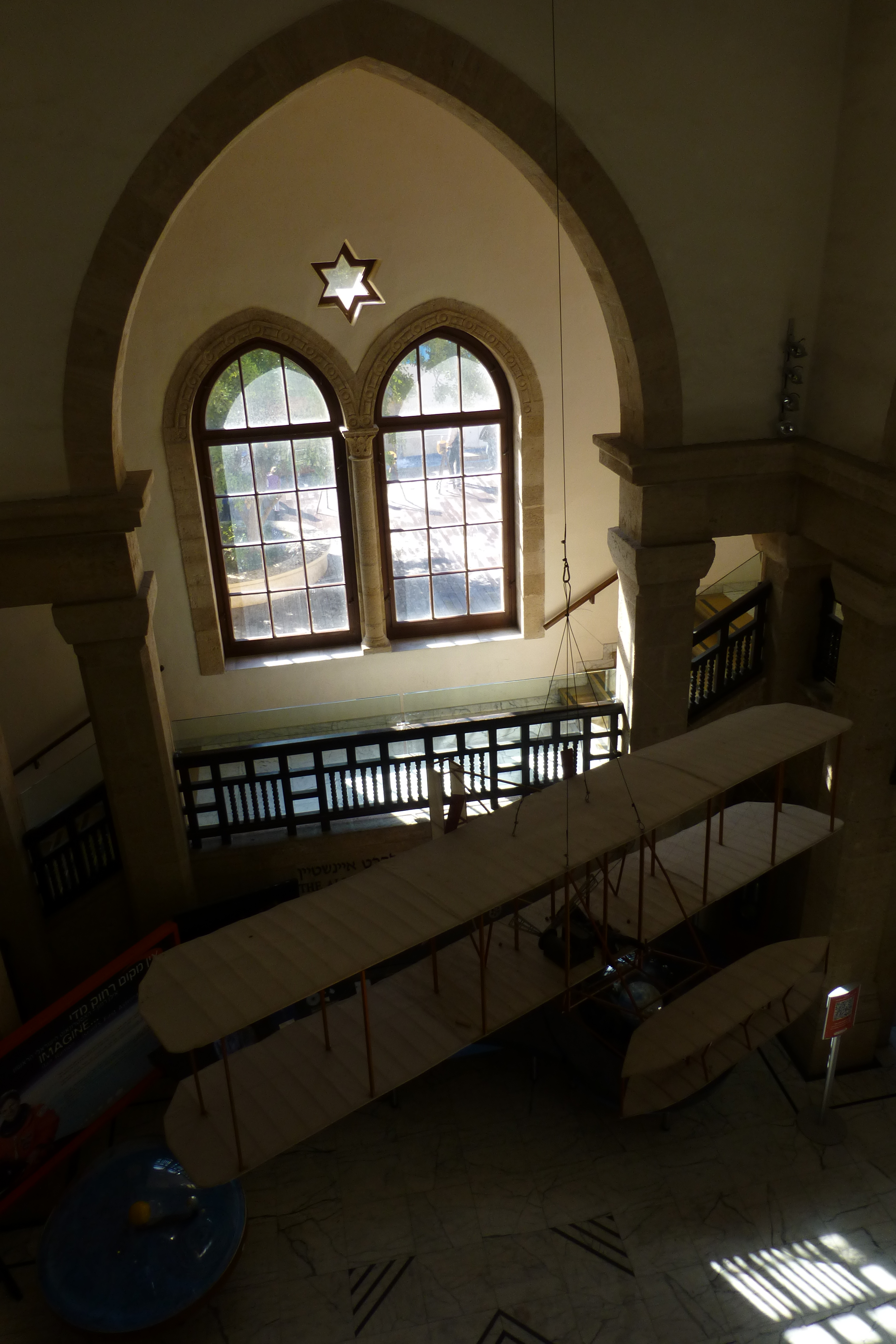 בניין הטכניון ההיסטורי בשכונת הדר כרמל בחיפה